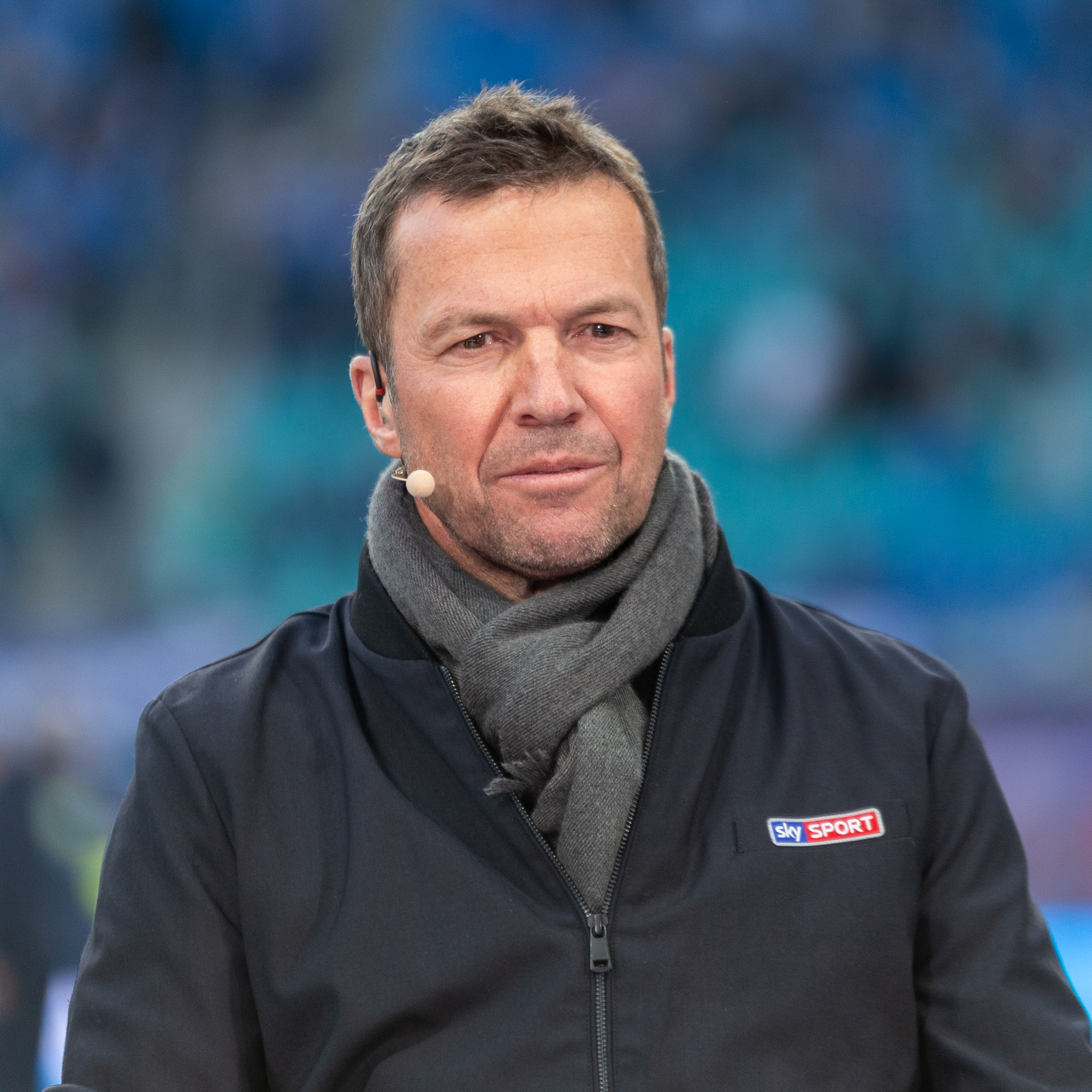 Fußball, Männer, 1. Bundesliga, RB Leipzig - Hertha BSC; Lothar Matthäus; Porträt, Einzelbild